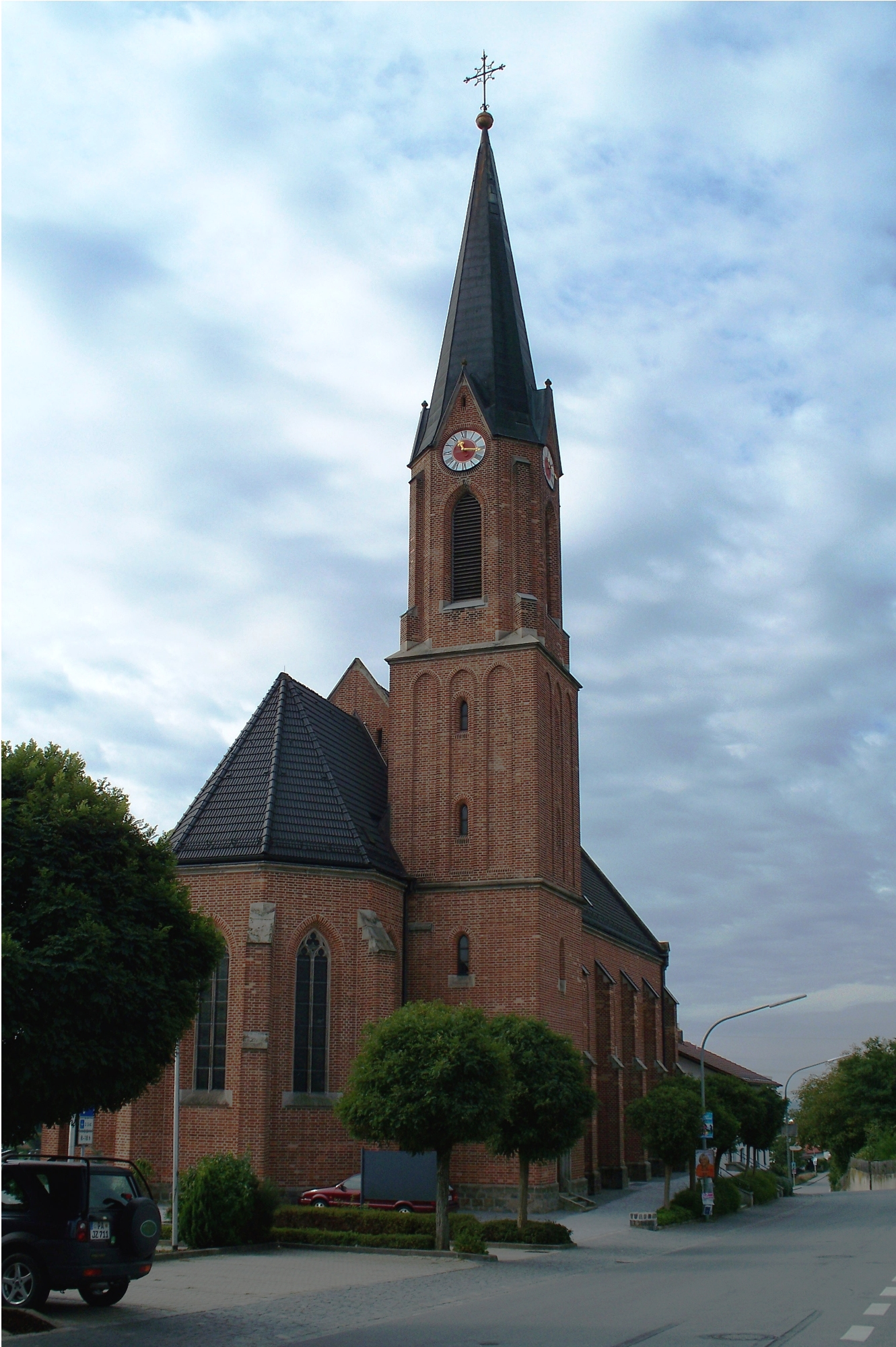 Pfarrkirche St. Josef von Alkofen (zur Stadt Vilshofen an der Donau gehörend.)